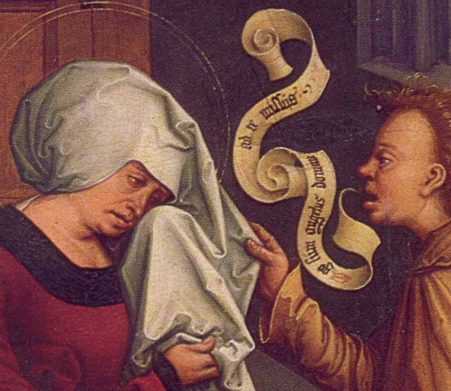 Saint Anne and Angel (detail) - Bernhard Strigel (1506/1507)